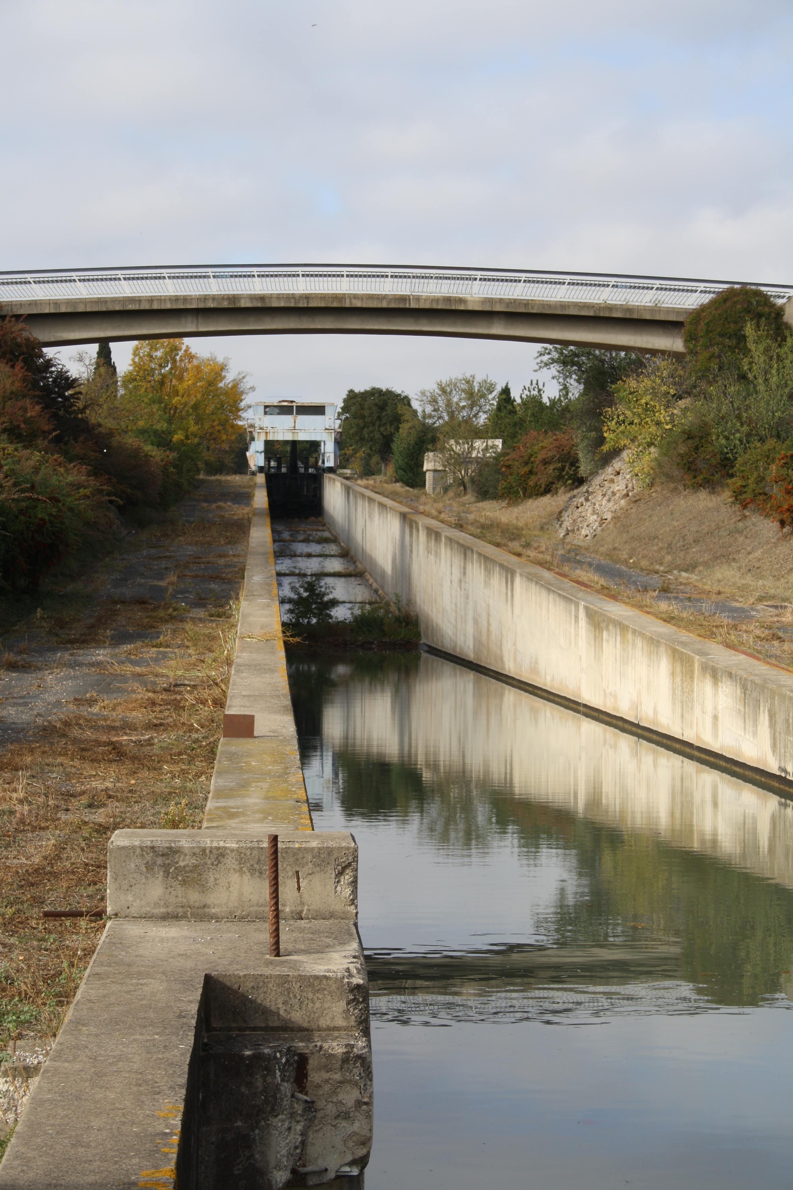 Wasserkeilhebewerk Fonserannes